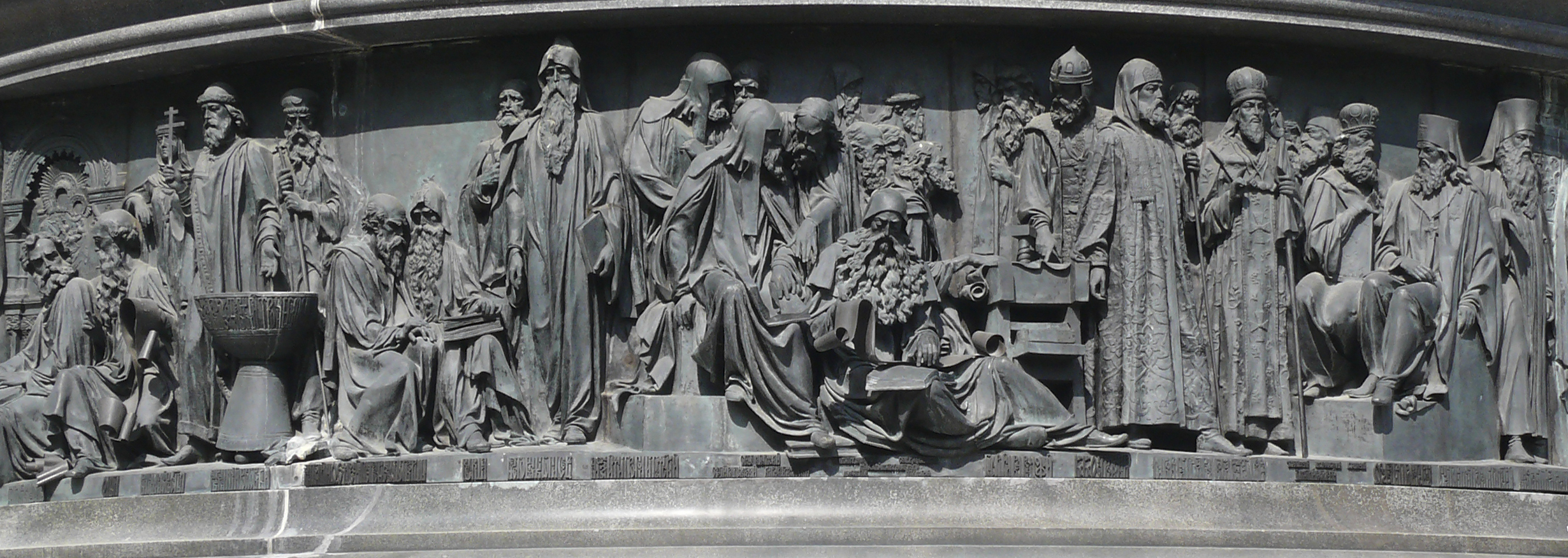 Скульптурная группа "Просветители" на Памятнике "1000-летие России" в Великом Новгороде The group of enlighteners and religious people on the Monument «Millennium of Russia» in Veliky Novgorod